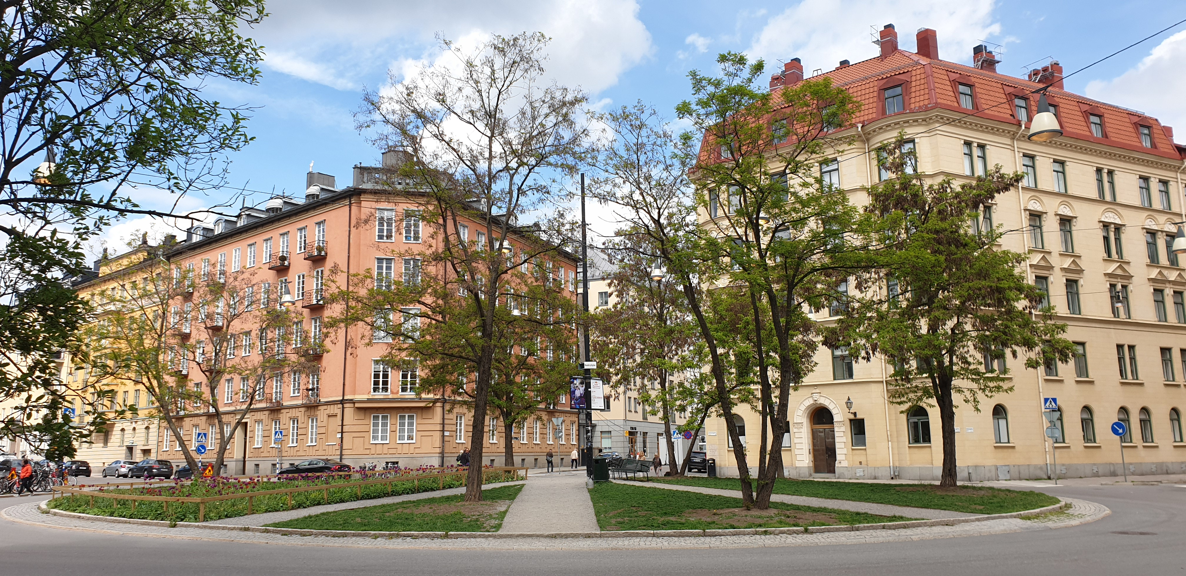 Danderydsplan, may 2019.